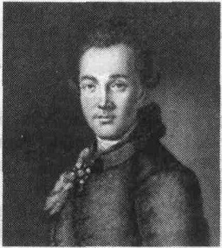 Matvei Kazakov (1738—1812), russian architect